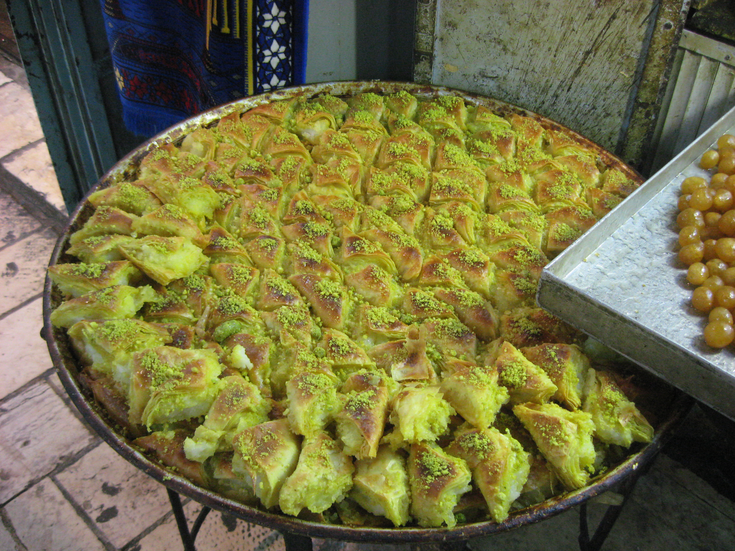 Baklava Jerusalem